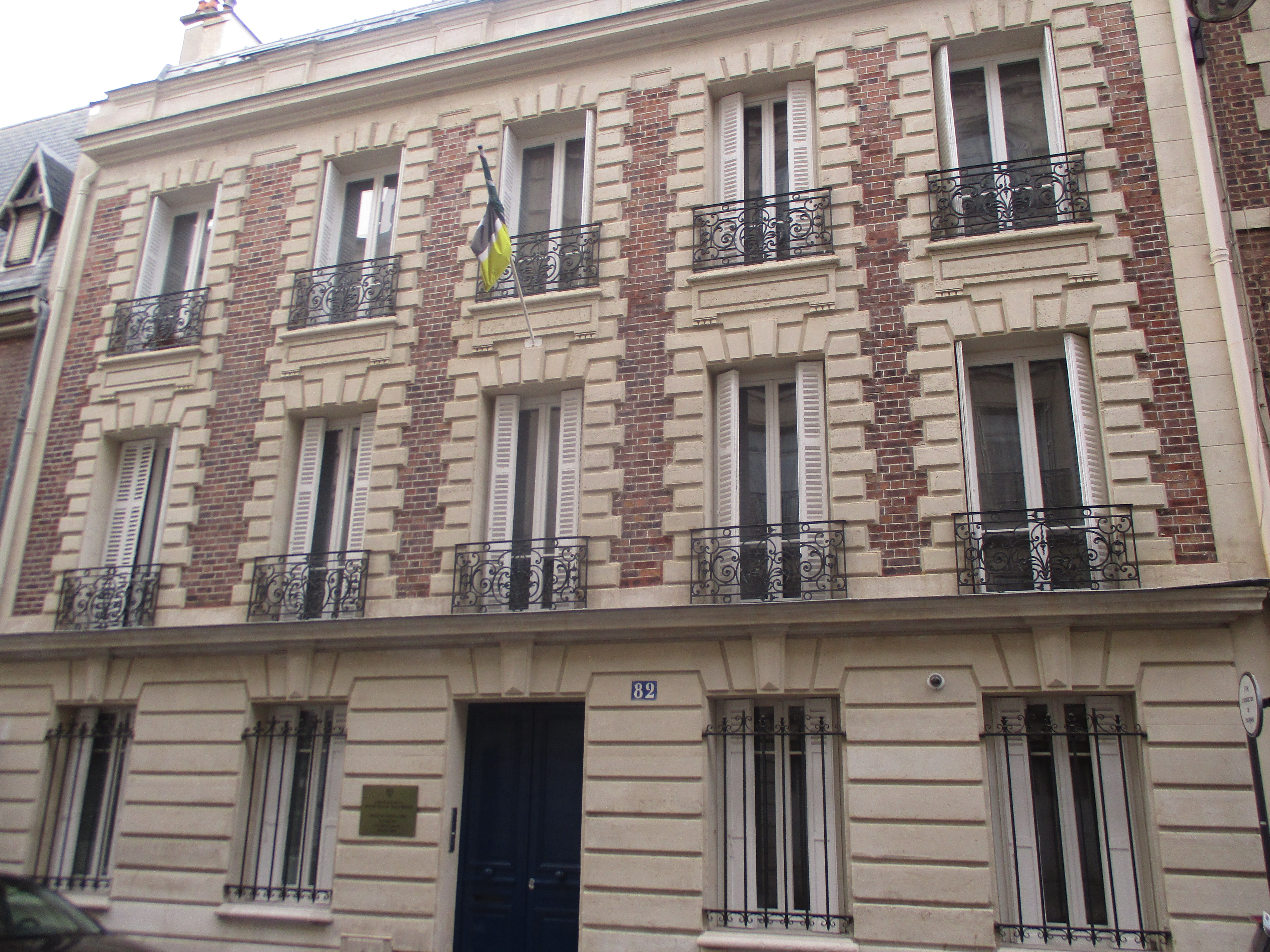 Ambassade du Mozambique, 82 rue Laugier, Paris XVIIe.